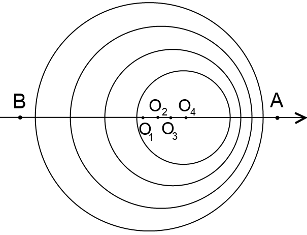 Deplasarea sursei sonore 1